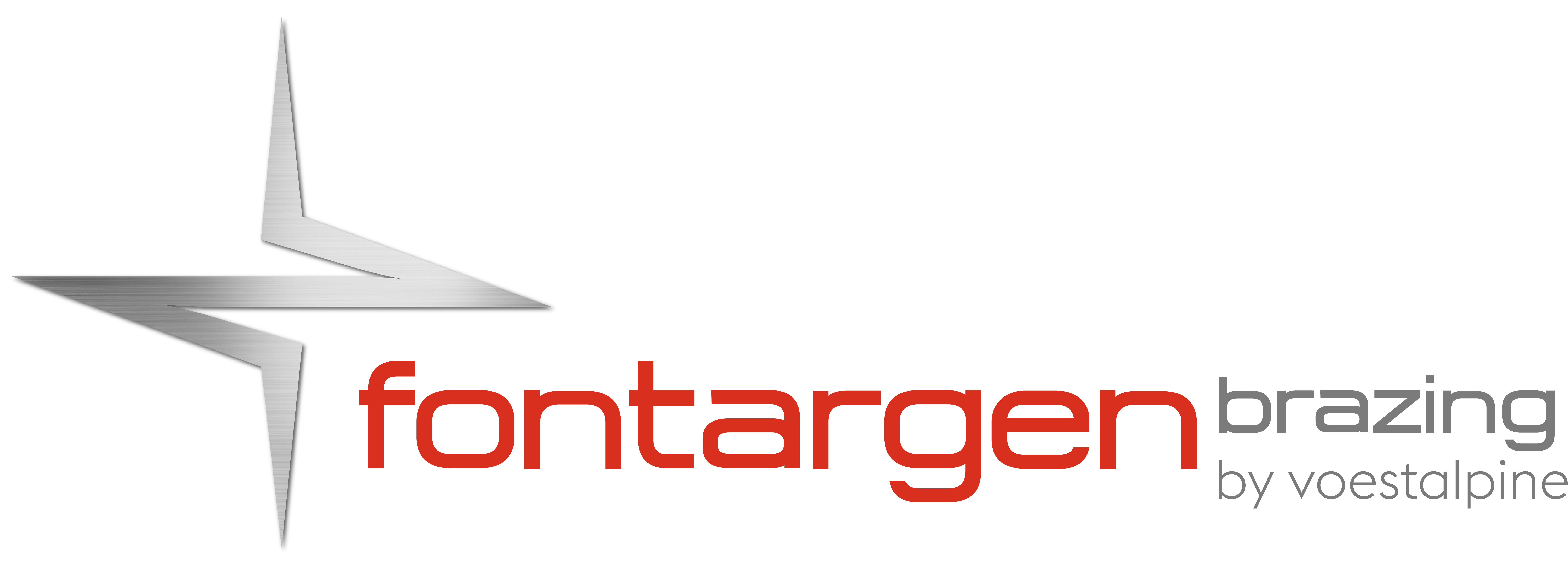 In-Depth Know-How